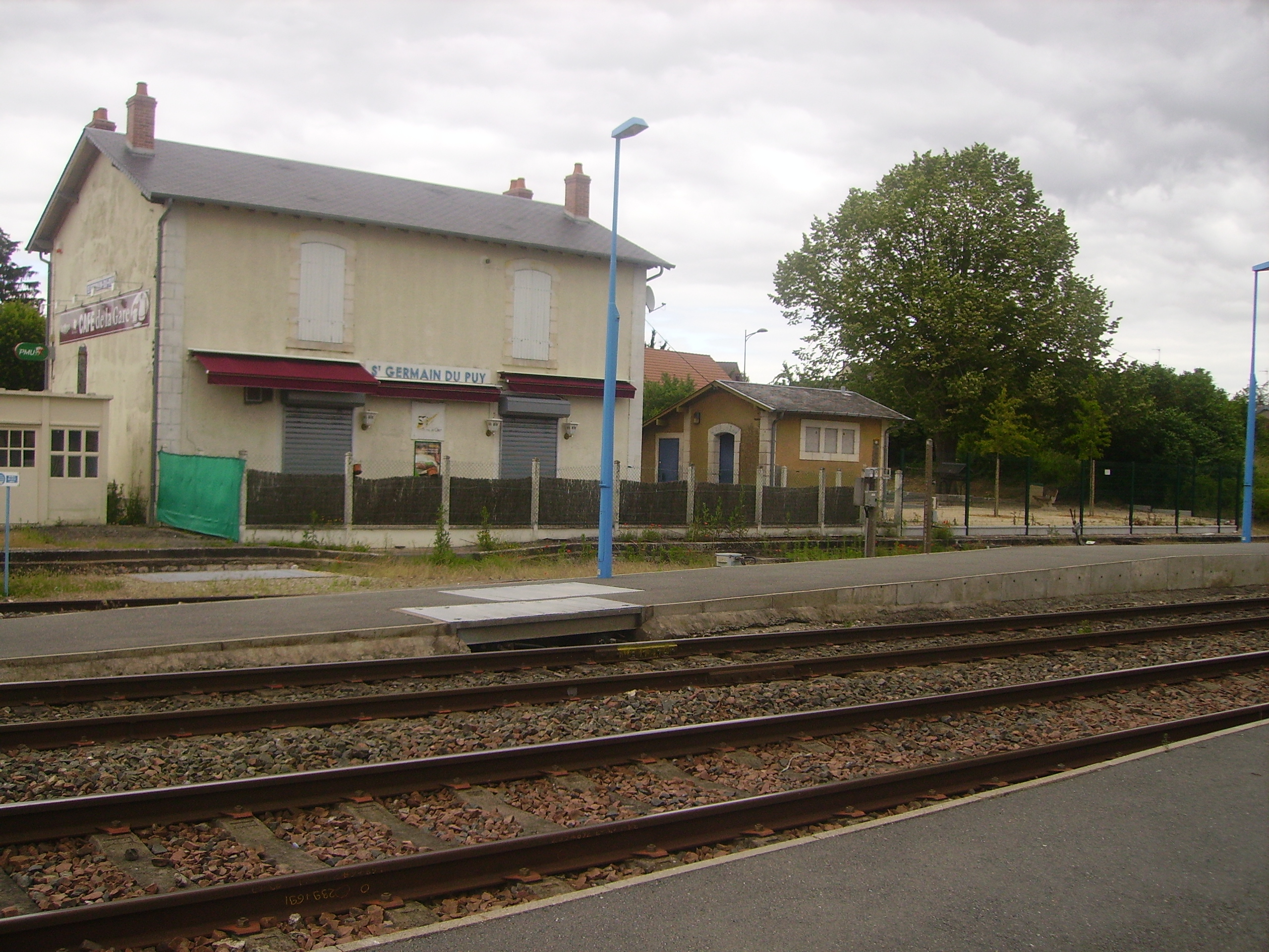 Gare de Saint Germain du Puy